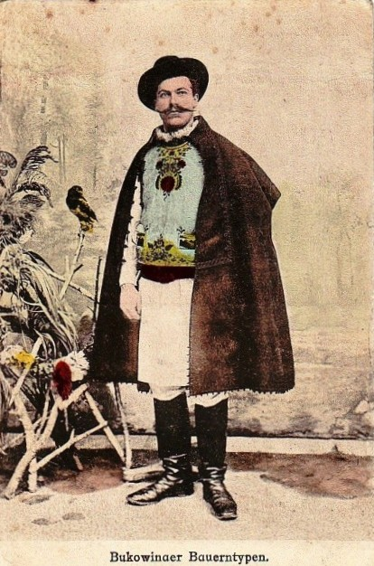 Буковинский крестьянин в национальной одежде. Начало XX в.